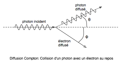 Schéma montrant la collision d'un photon avec un électron, pour illustrer la diffusion compton.